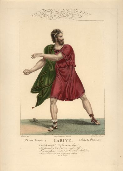 Jean Maudit de Larive